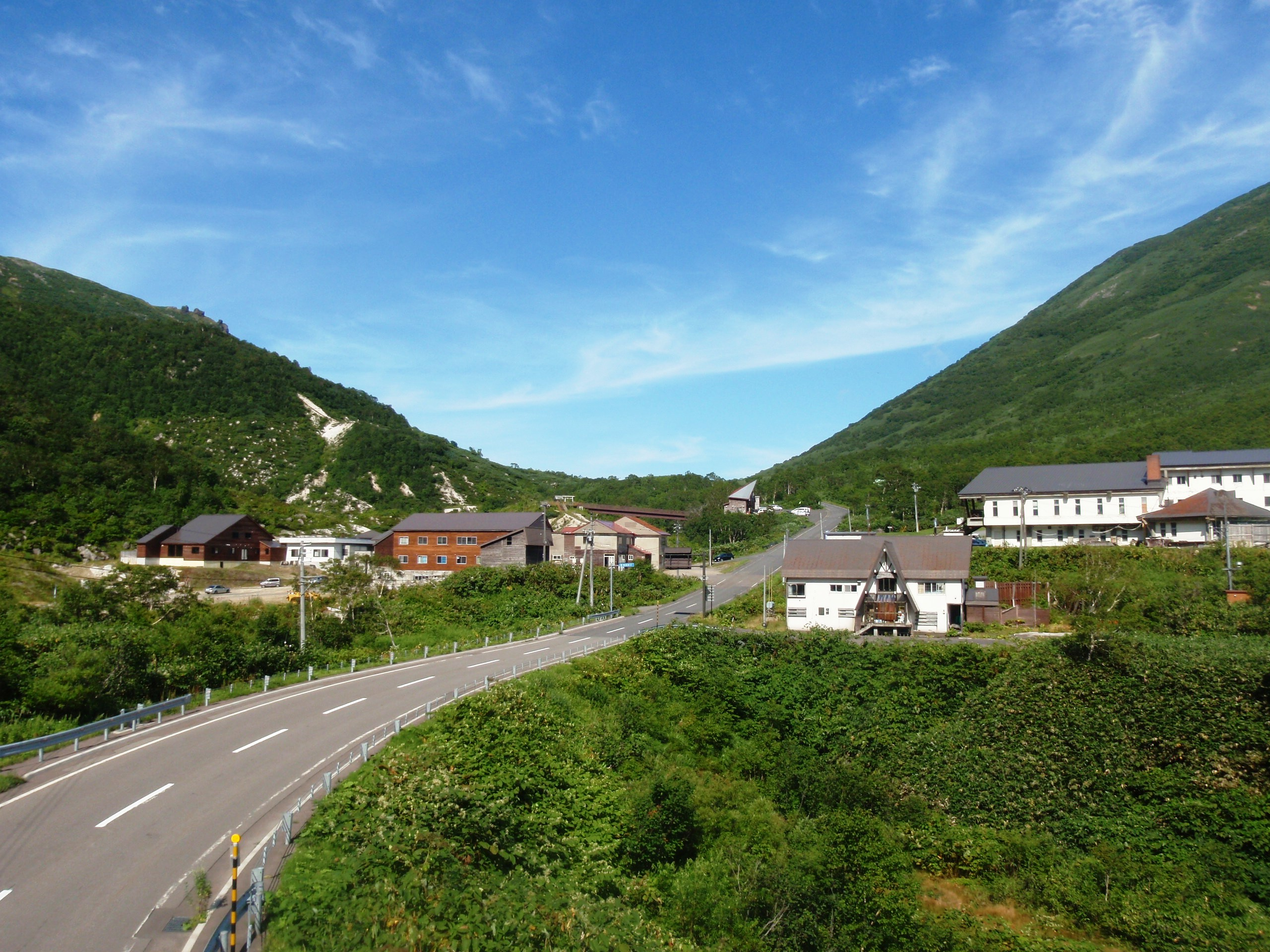 ニセコ五色温泉街。左：ニセコ五色温泉旅館、右：山の家